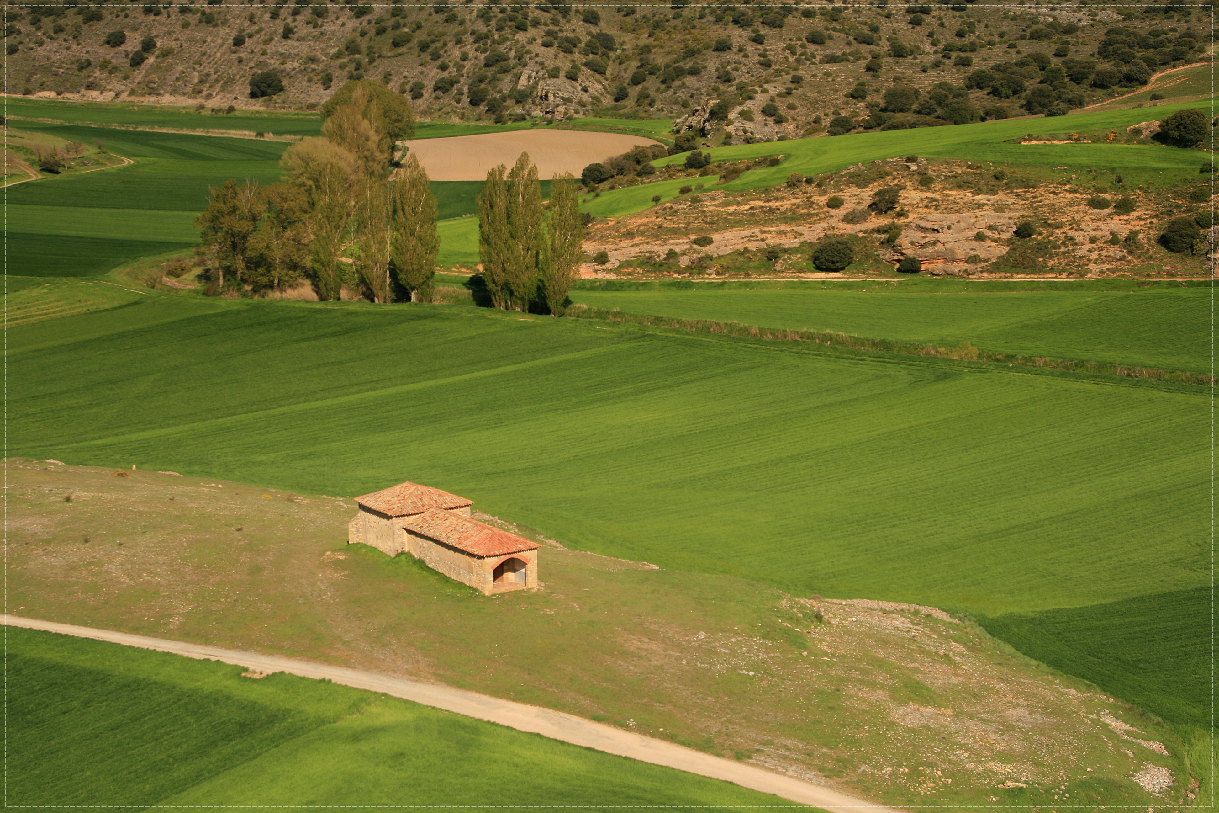 Ermita de la Virgen de la Sopeña, la cual debe su nombre a su ubicación debajo de las piedras del castillo.